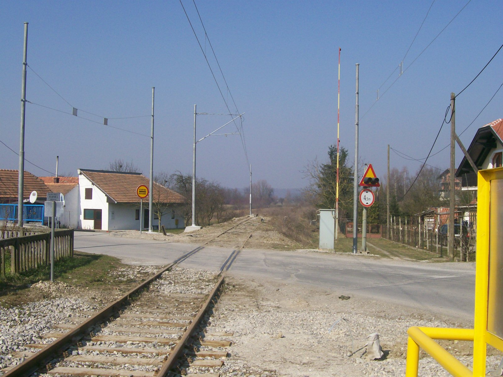 Željeznička stanica Harmica, željezničko cestovni prijelaz, za vrijeme obnove pruge, 2008.